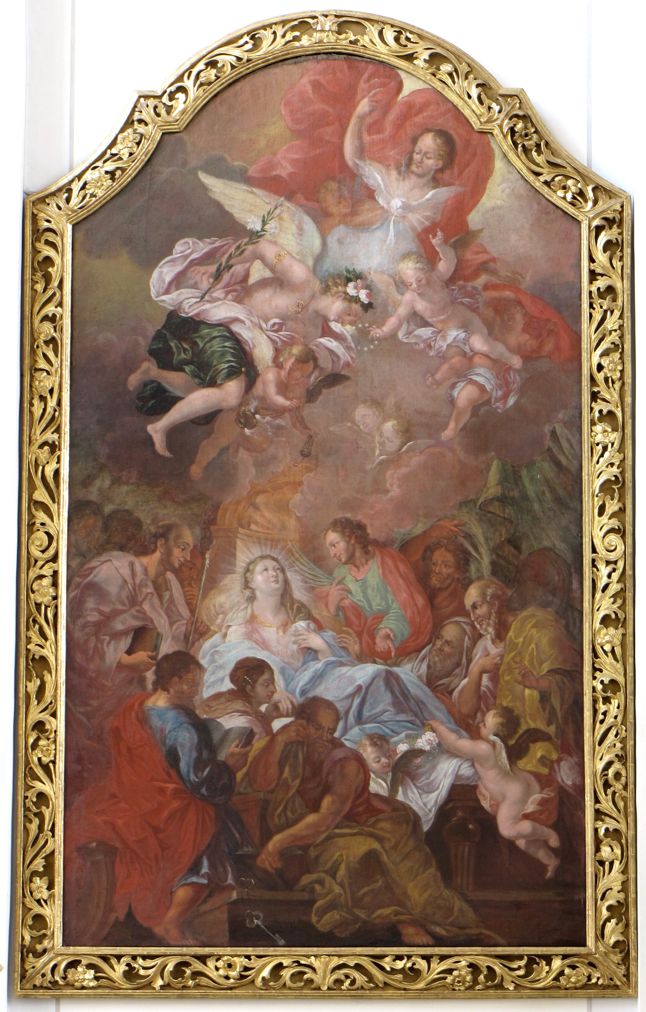 Tod Mariens, Altarbild von Johann Georg Bergmüller in Ummendorf